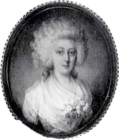 épouse de l'architecte Jean-François Chalgrin, fille du peintre Claude Joseph Vernet.